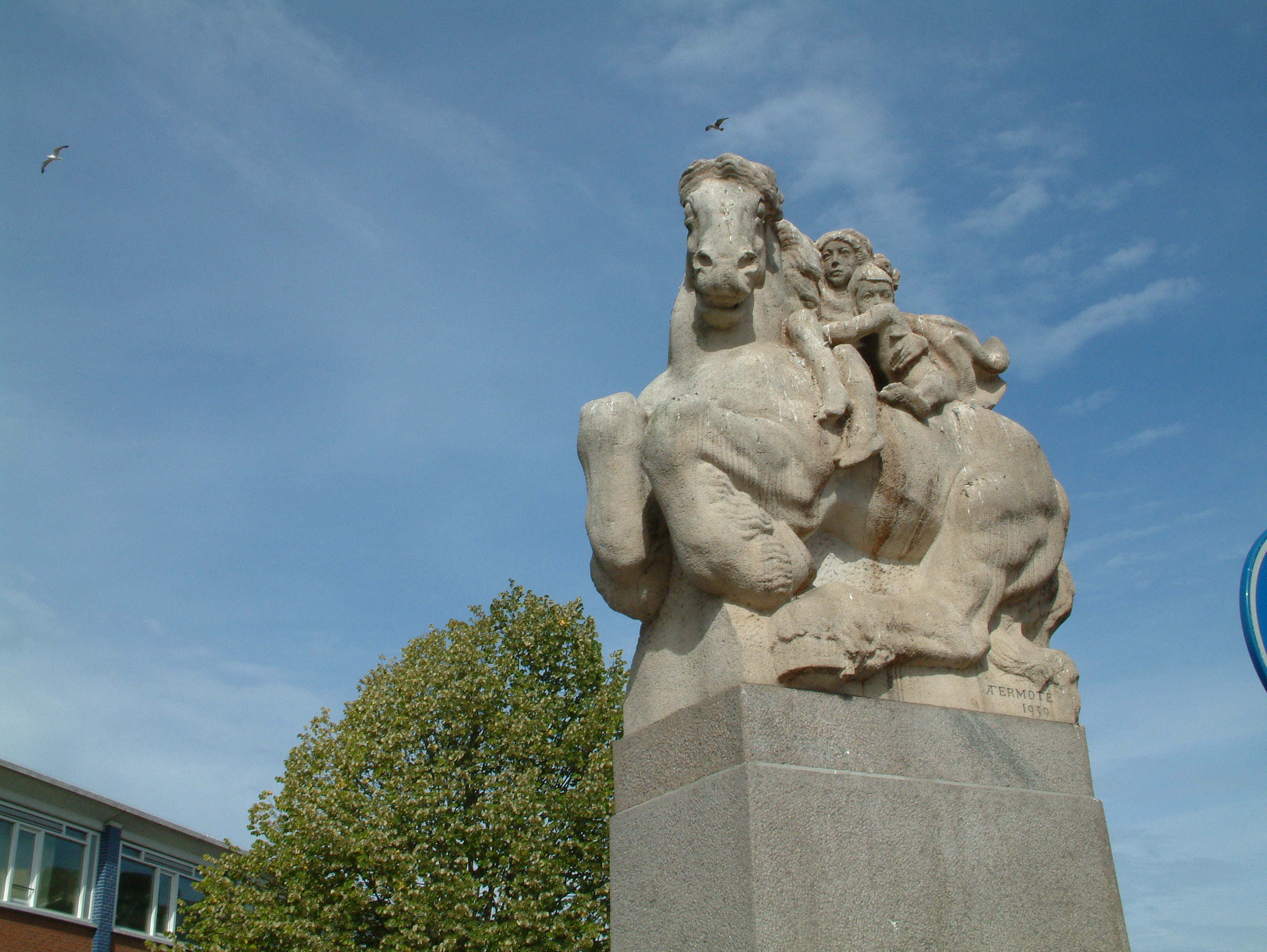 Brug in Den Haag